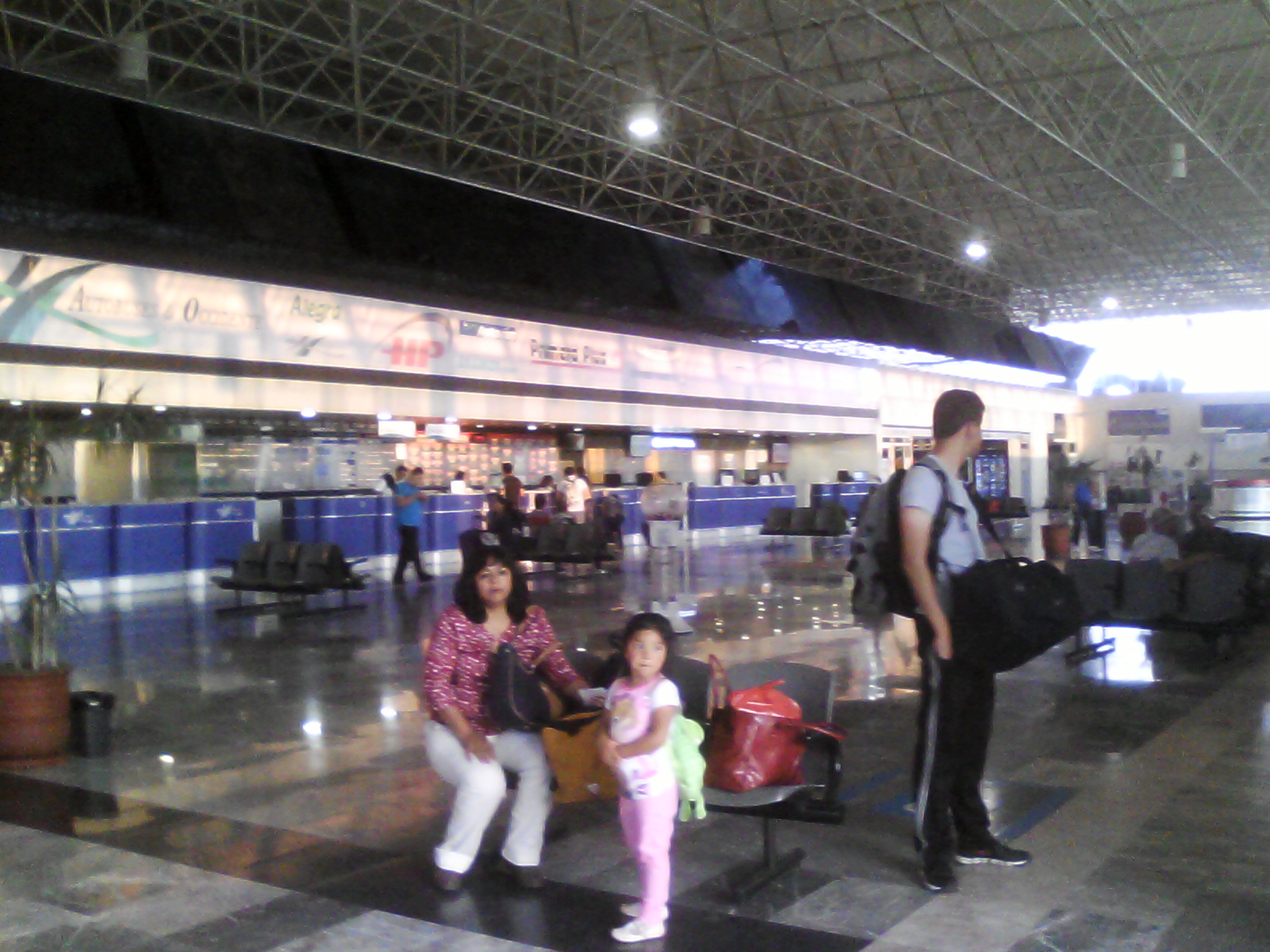 de la central de autobuses de Morelia